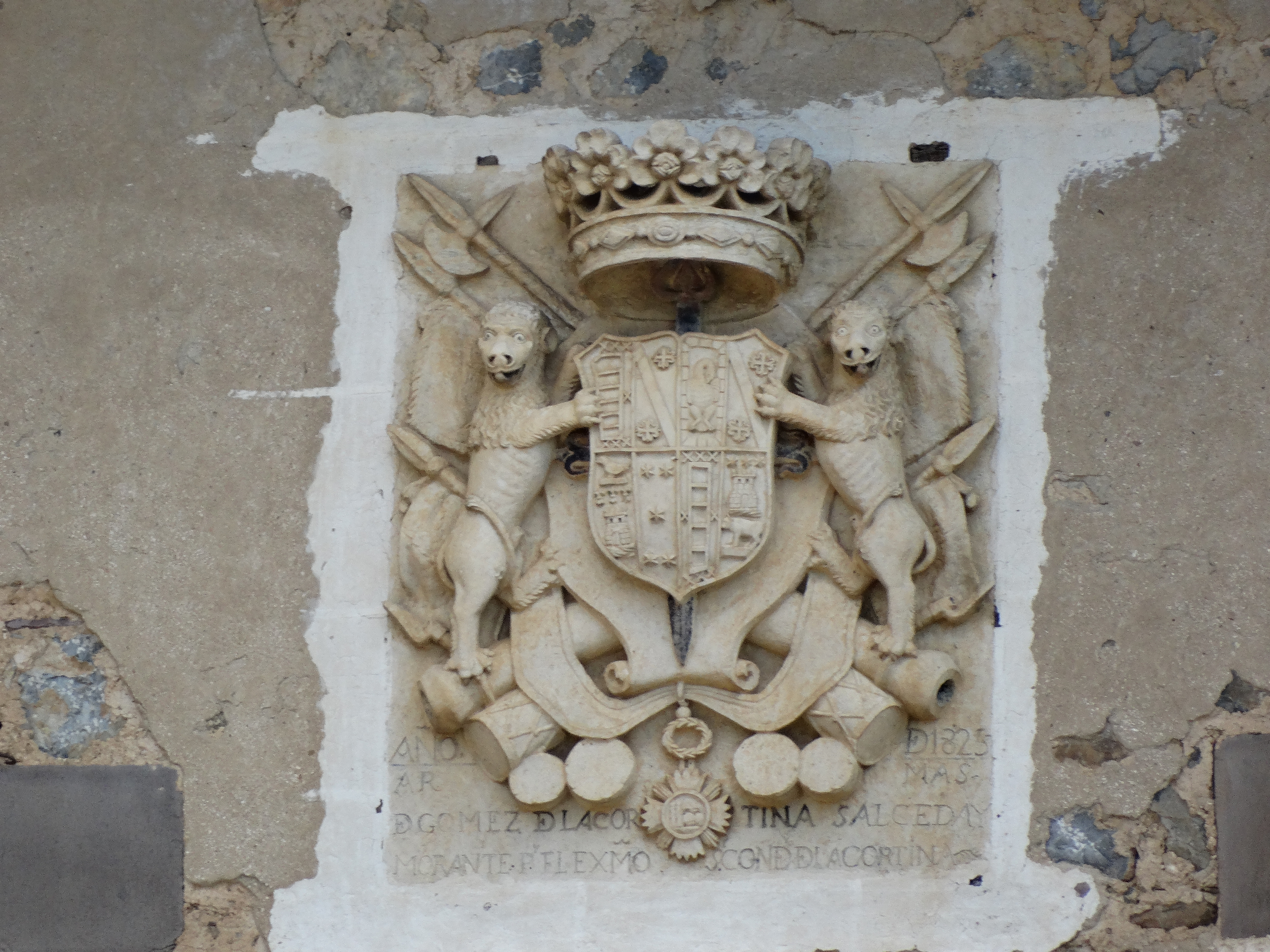 Salarzón es una localidad del municipio de Cillorigo de Liébana, en la comarca de Liébana (Cantabria, España). Casa palacio de la familia Gómez de la Cortina mandada construir por el conde de la Cortina Vicente Gómez de la Cortina y Salceda.